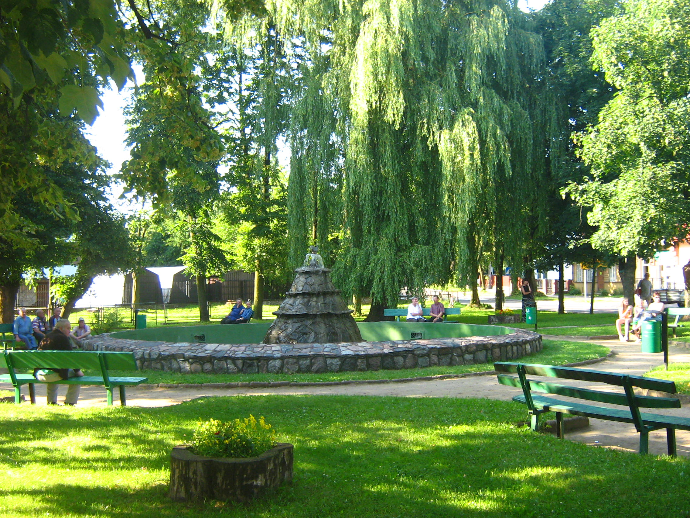 Park z fontanną w Sejnach.